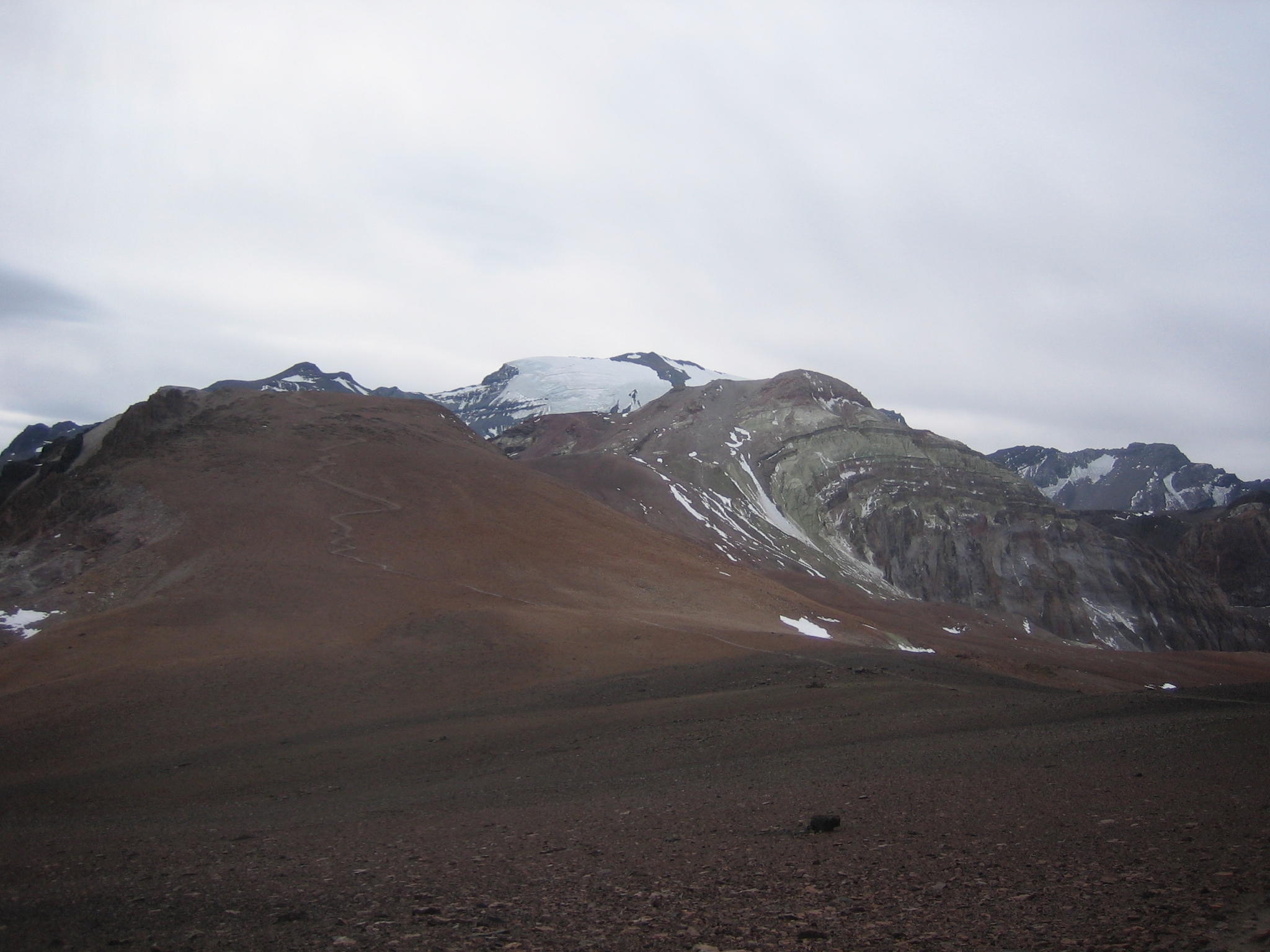 Cerro El Pintor near Santiago de Chile